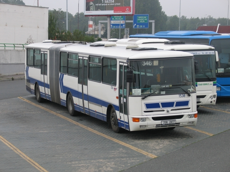 Karosa C943 of ČSAD Střední Čechy, Prague, Černý Most